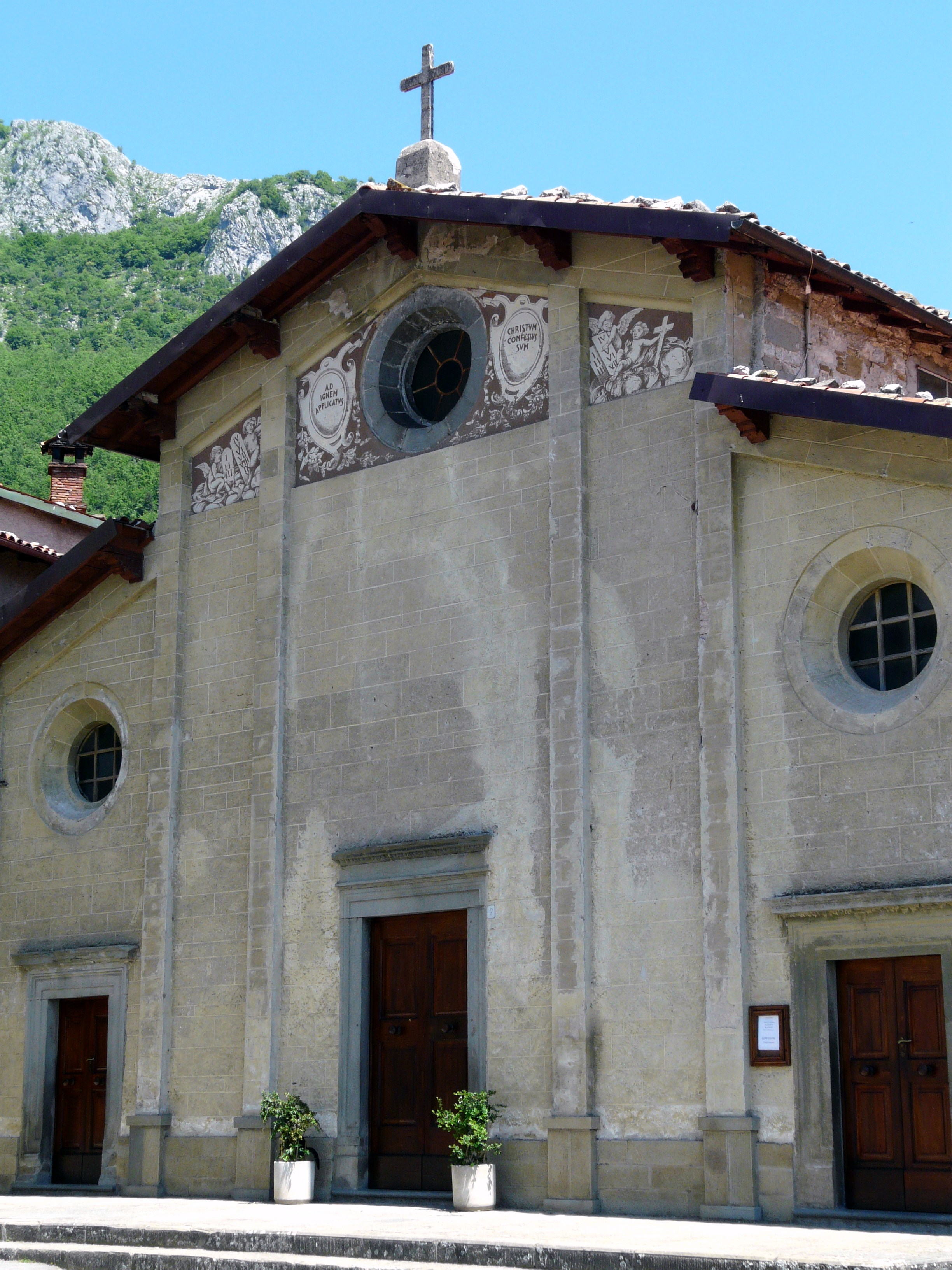 Facciata della chiesa di San Lorenzo, Corfino, Villa Collemandina, Toscana, Italia